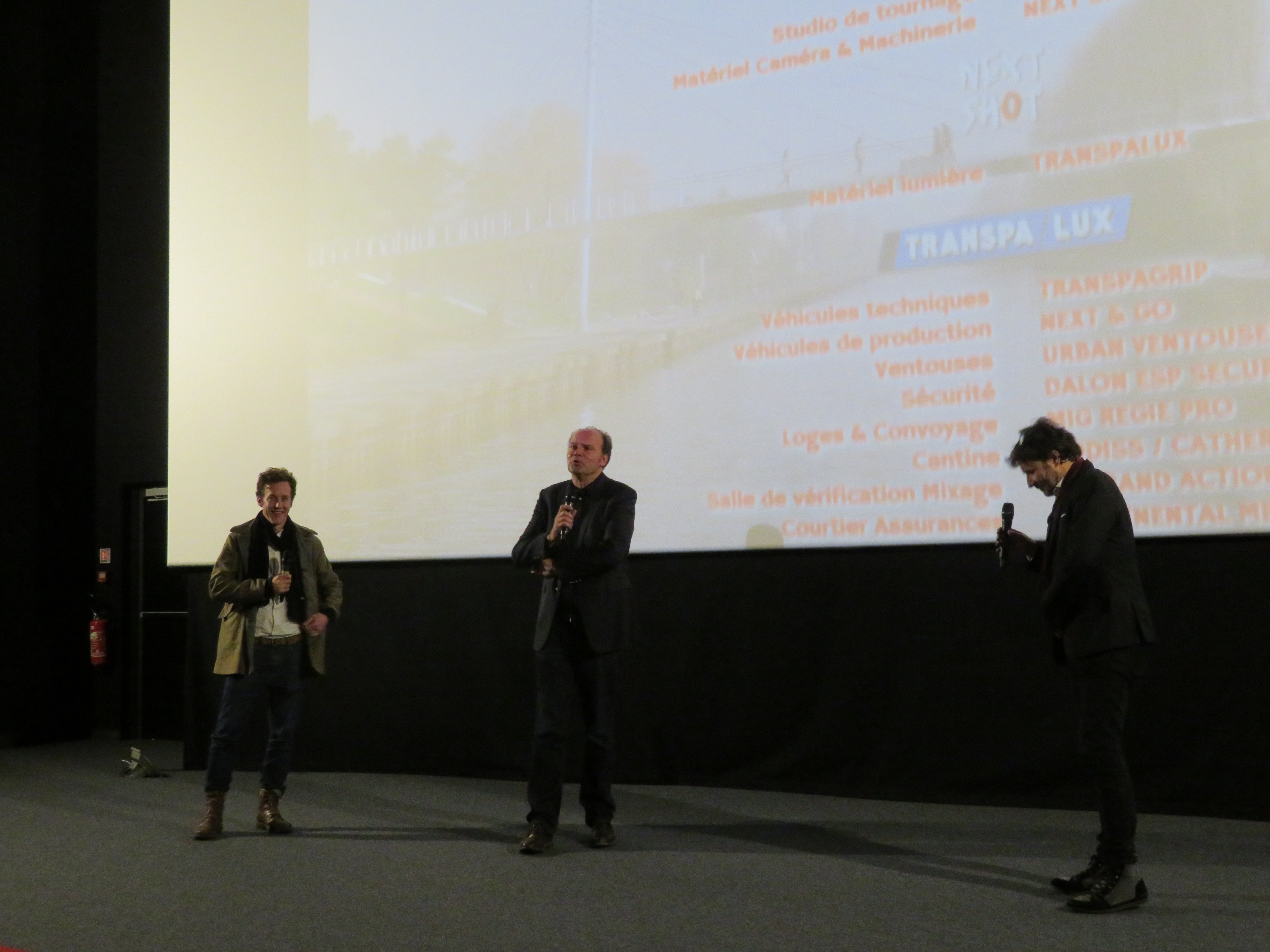 Le compositeur Quentin Sirjacq, le réalisateur Jean-Pierre Améris et le journaliste Christophe Carrière à l'avant-première du film "Je Vais Mieux" de Jean-Pierre Améris à Beauvais (Oise), le 24 novembre 2017.